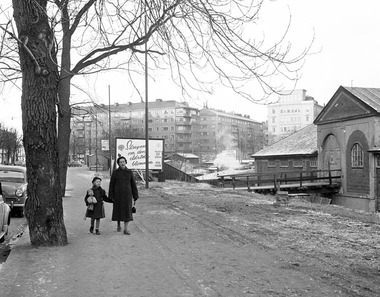 Gropen. Kåkbebyggelse i kvarteret Fältöversten, korsningen Erik Dalbergsallén/Valhallavägen